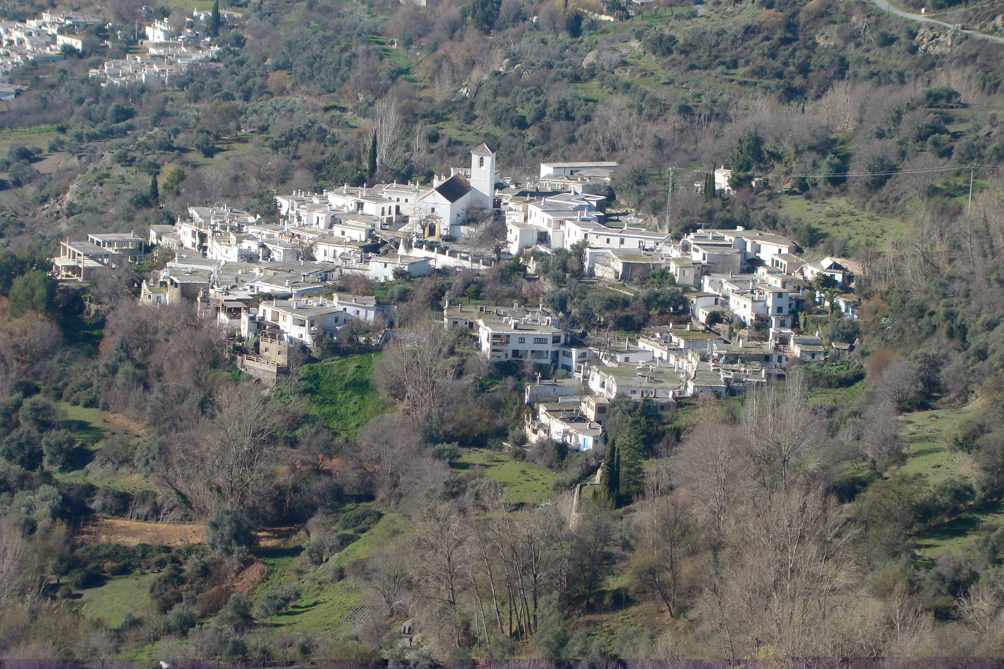 Vista de Ferreirola, en el municipio de La Taha (Granada, España) desde la Mezquita de Busquístar